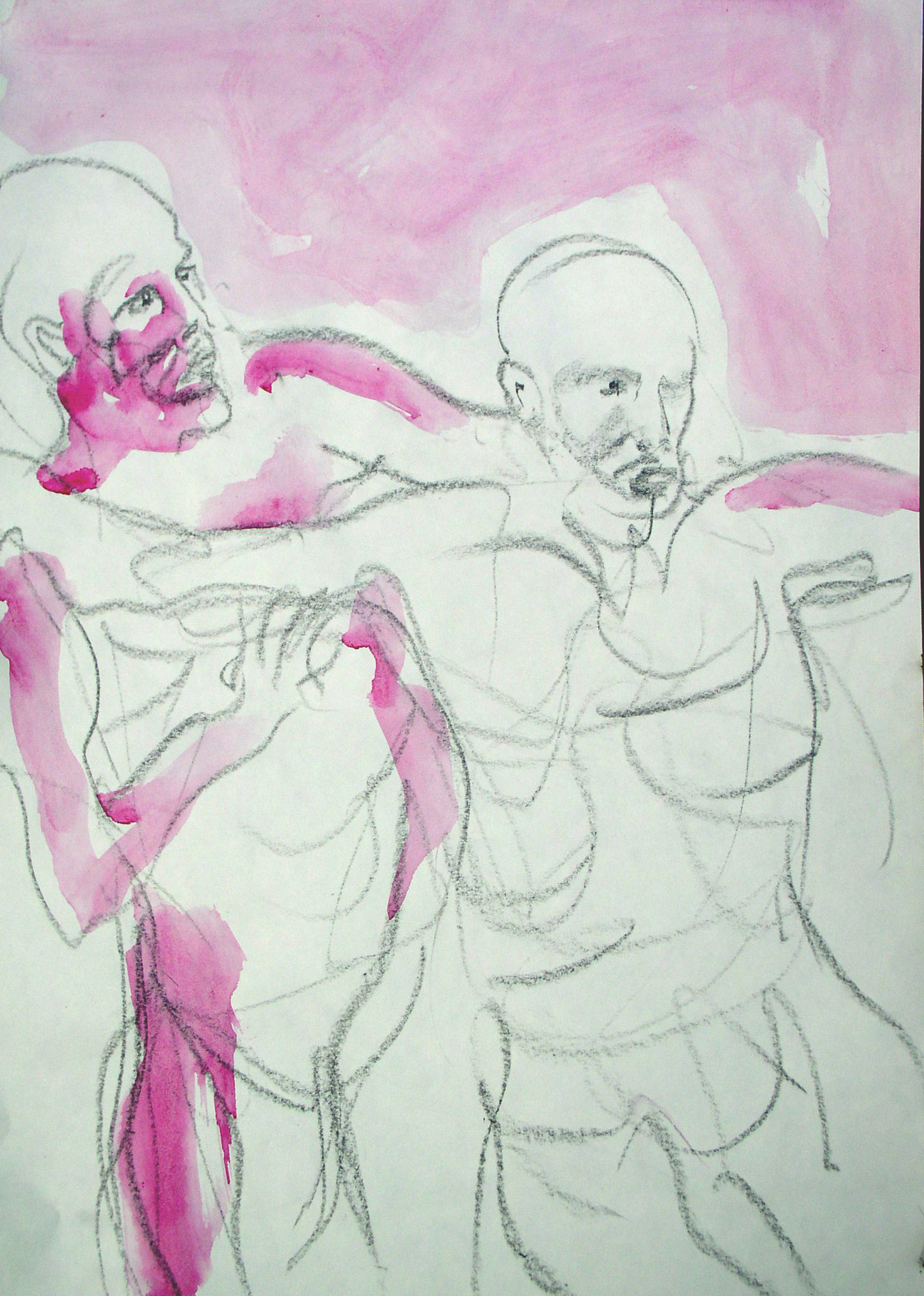 Eine kollorierte Bleistiftzeichnung, die der Bildhauer Peter Marggraf für die Kassette "Lenz" gezeichnet hat.